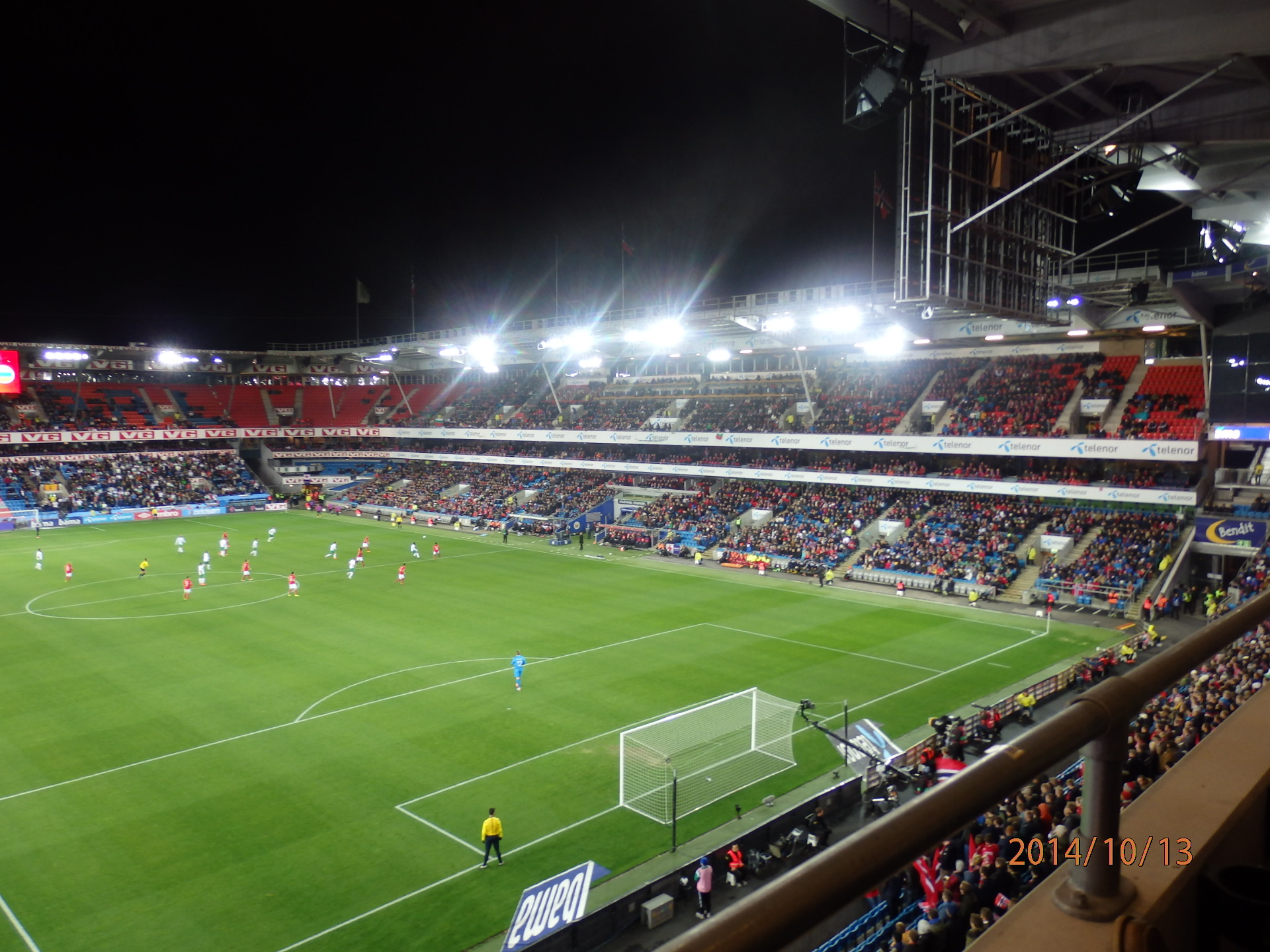 Ullevaal Stadion 13.10.2014